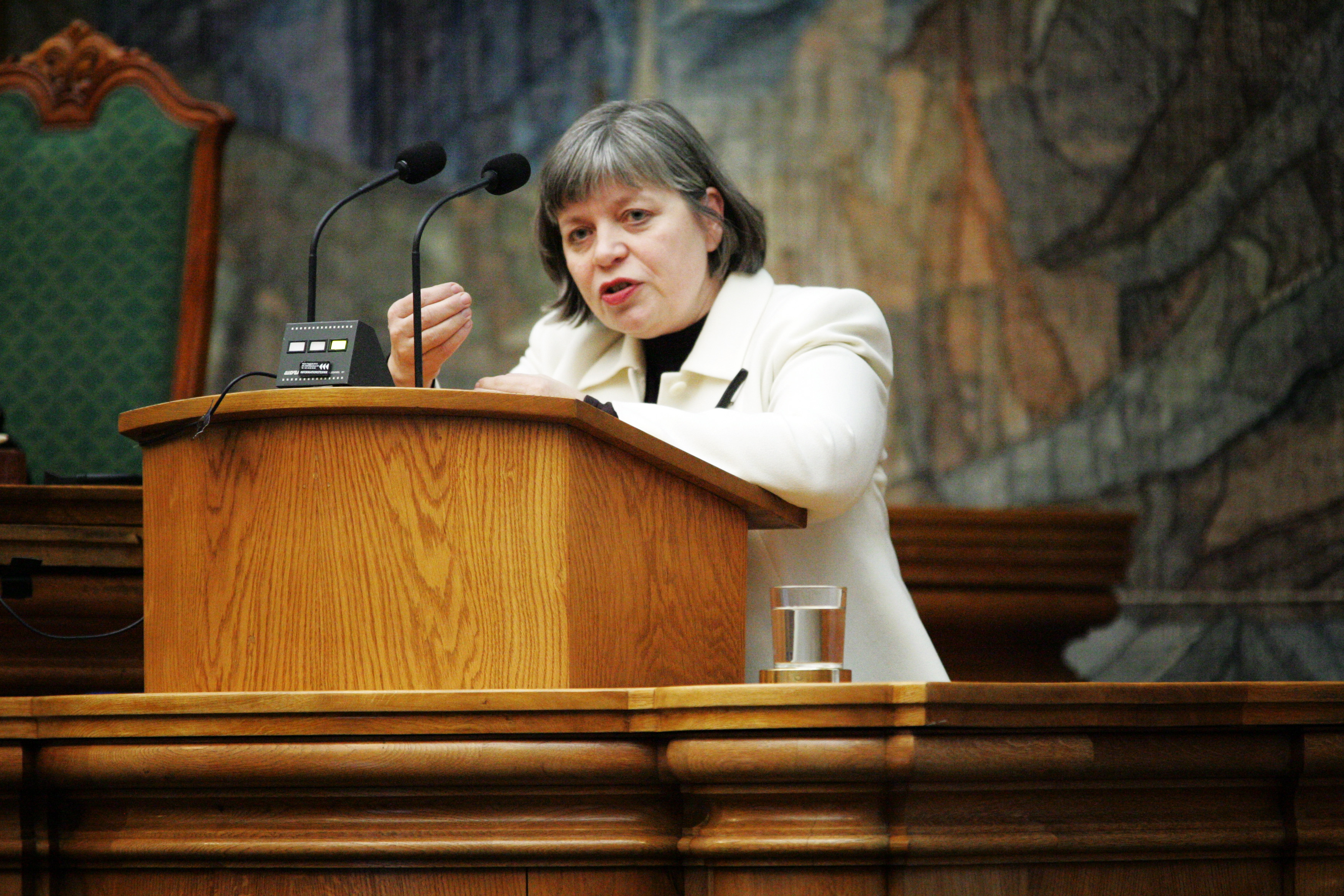 Arja Alho (sd) Finland, talar vid Nordiska rådet session i Köpenhamn.